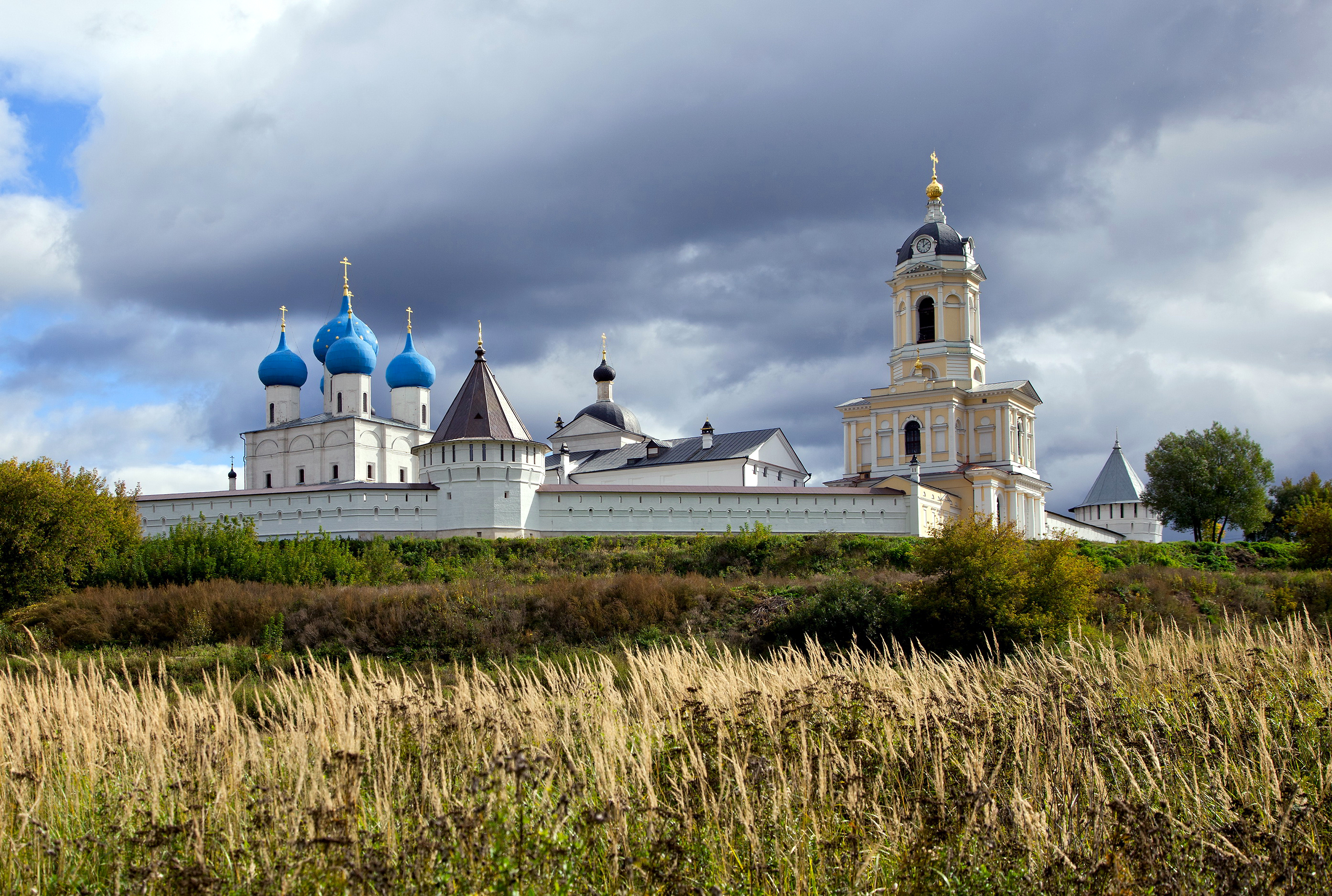 Vysotsky monastery / Serpukhov, Russia